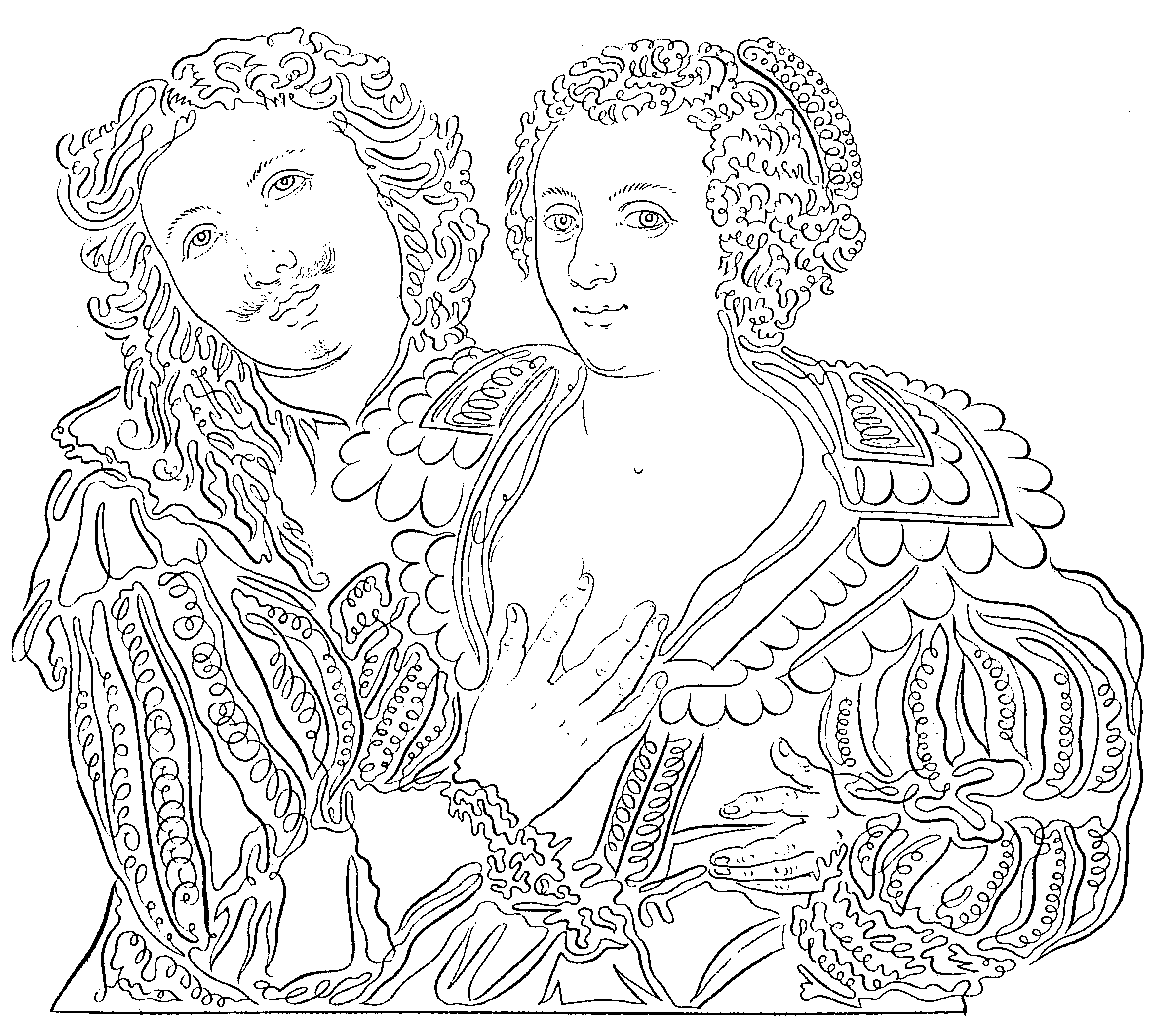 Balderic van Horicke, Trait de plume (c. 1630-1640).